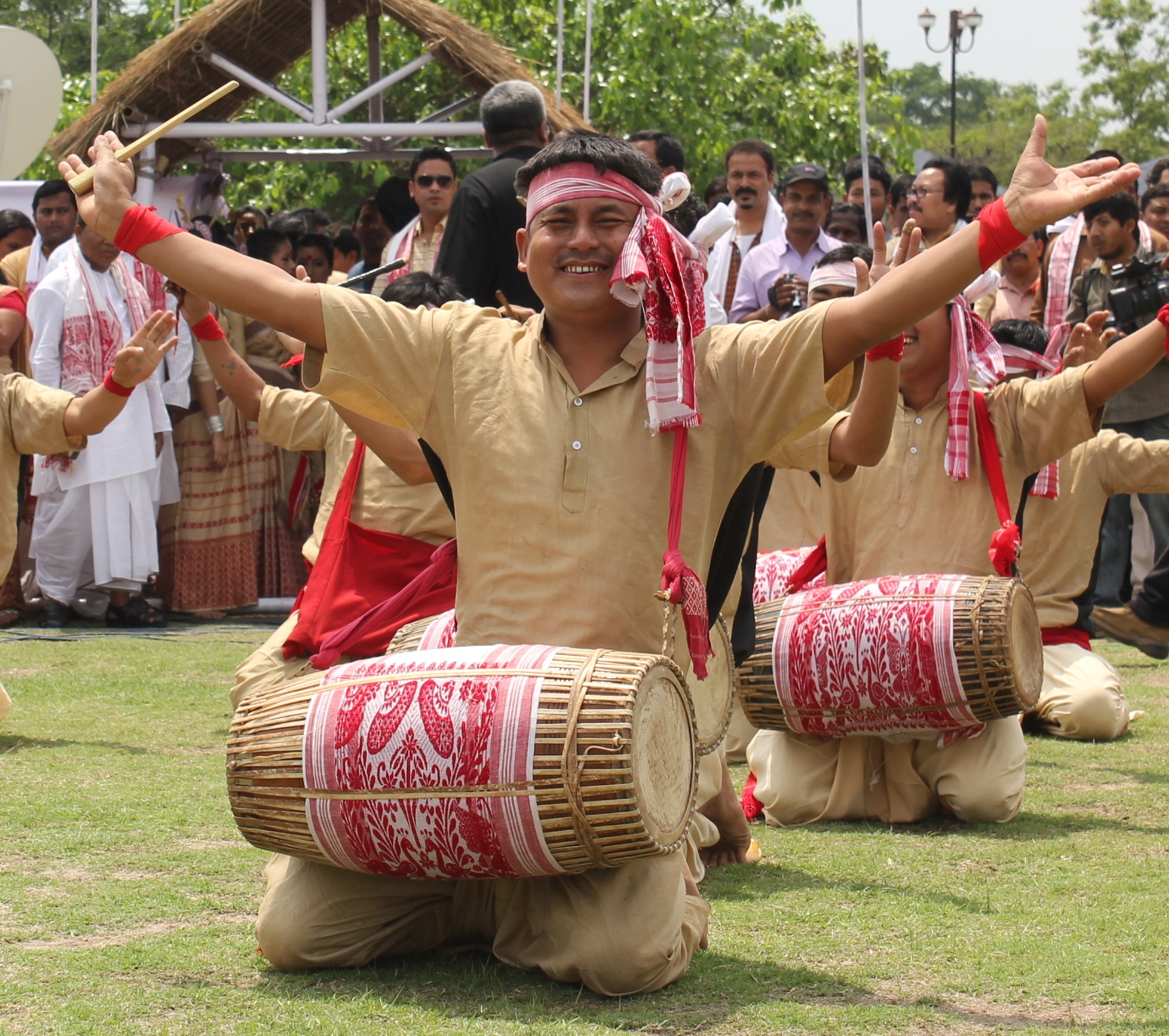 অসমীয়া: সদৌ গুৱাহাটী ছাত্র সংস্থাৰ দ্বাৰা গুৱাহাটীৰ জাজেচ খেলপথাৰত আয়োজিত মুকুলি বিহু (১৩-০৪-২০১২)ৰ এটি দৃশ্য।